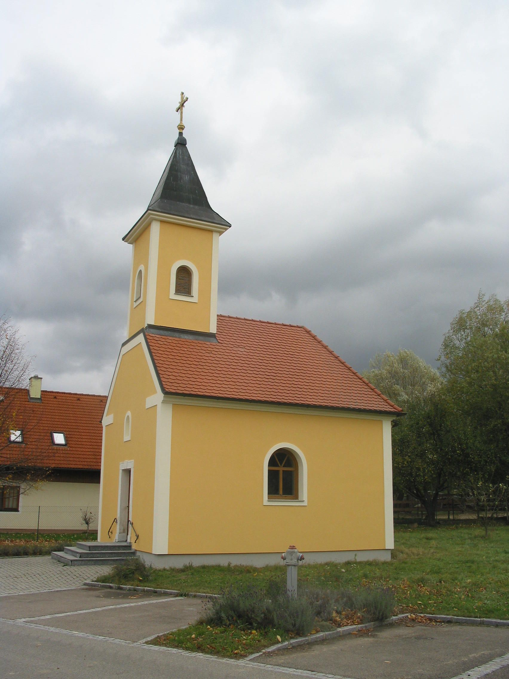 Kath. Kapelle in Gumping, Gemeinde Maissau.